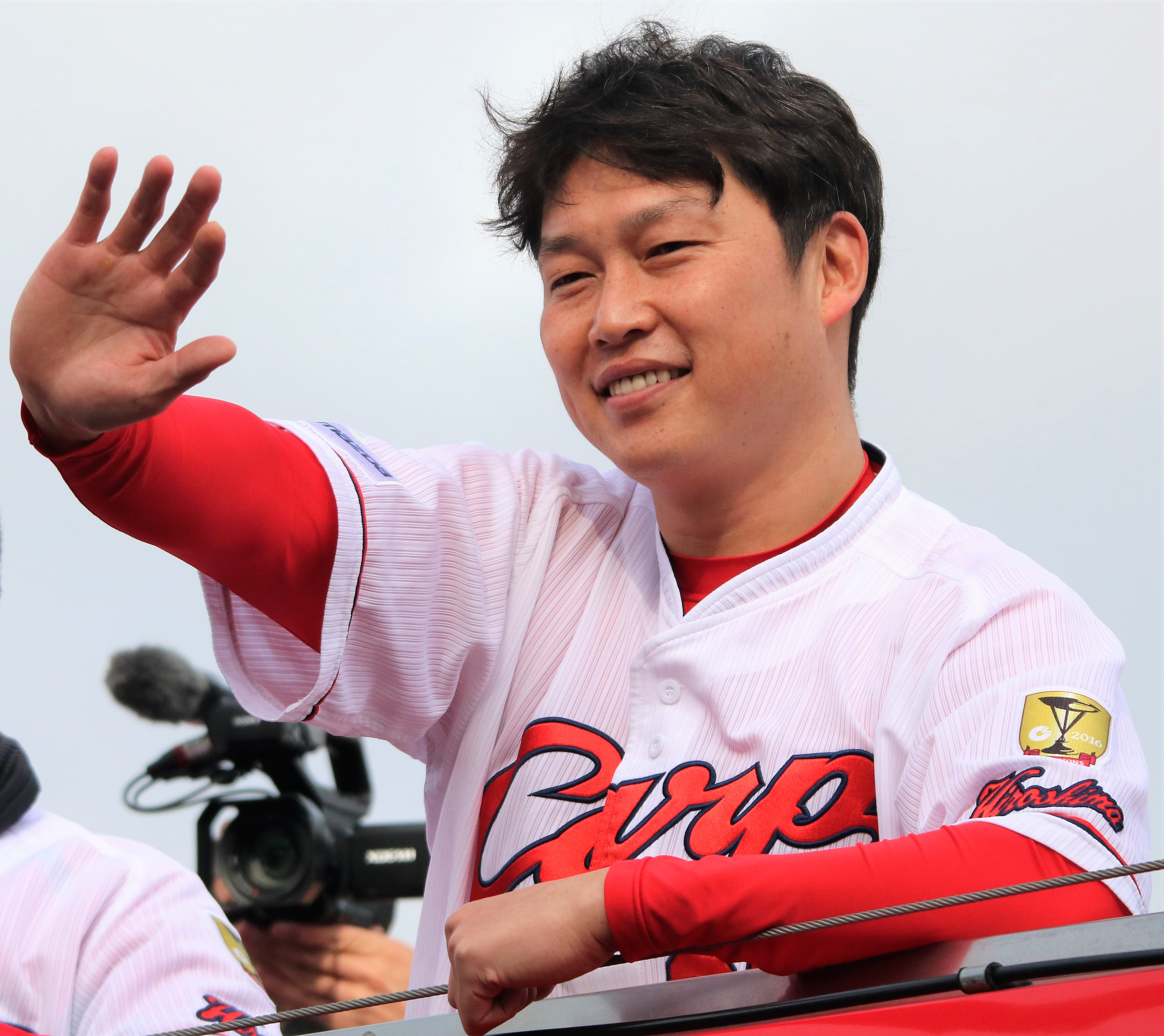 2017/11/25 優勝パレード